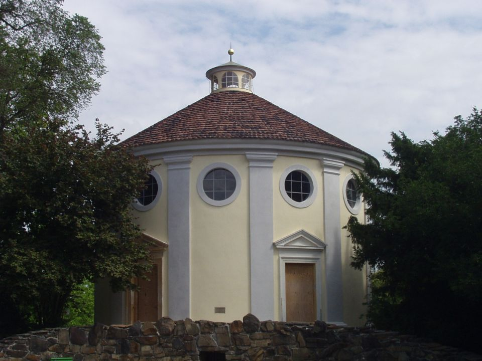 Neu renovierte Synagoge im Wörlitzer Park